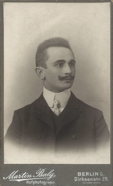 Porträt eines jungen Mannes mit Schnurrbart und hohem Kragen und weißer Krawatte. Porträt von Martin Balg, Carte de visite auf grauem Karton, 63 mm × 103 mm.